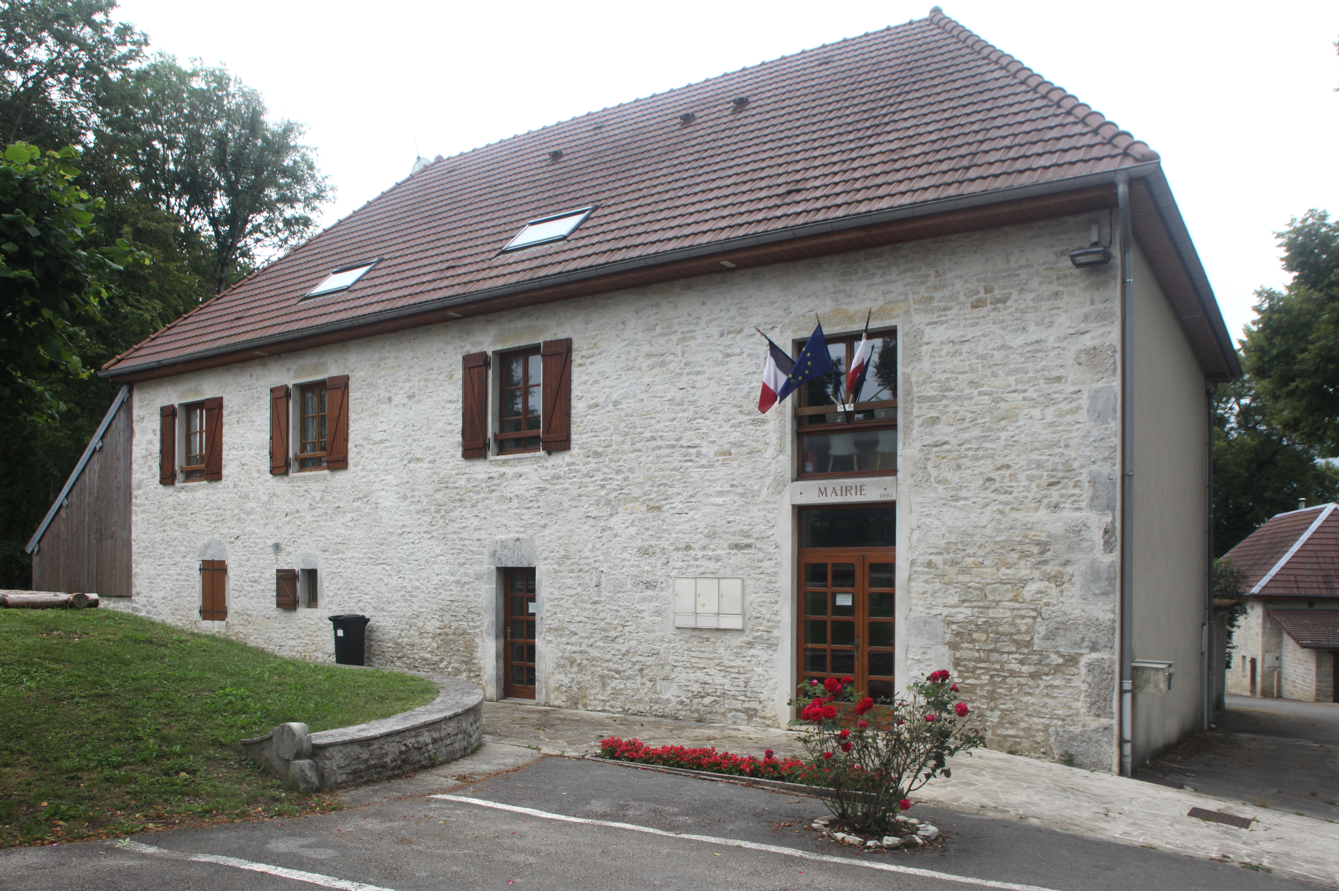 Mairie d'Étray (Doubs).